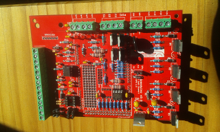 Imatge d'una placa Speeduino versió 0.3